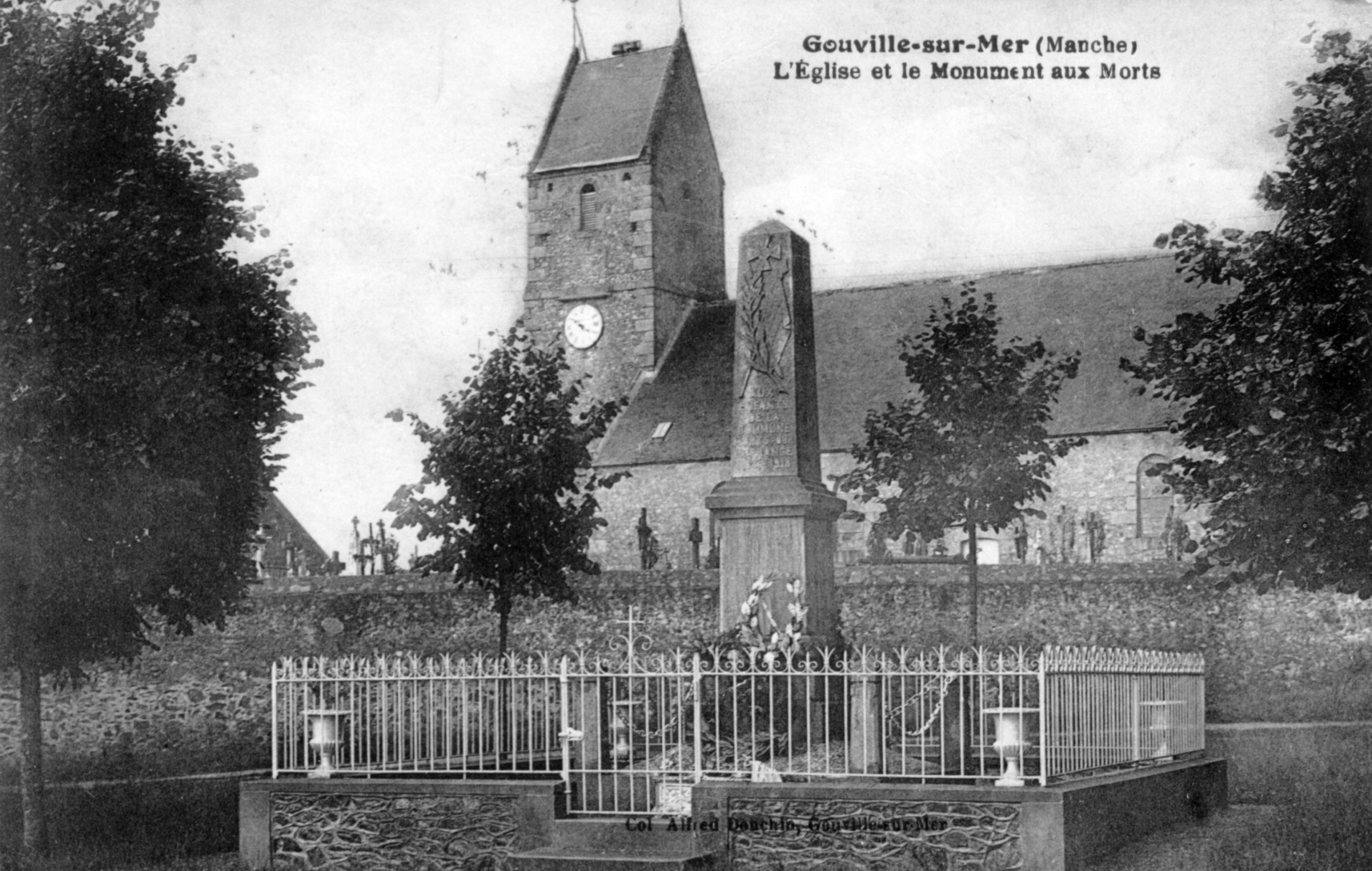 Gouville-sur-Mer (Manche). L'Eglise et le Monument aux Morts. Carte postale ancienne col. Alfred Donchin, Gouville-sur-Mer